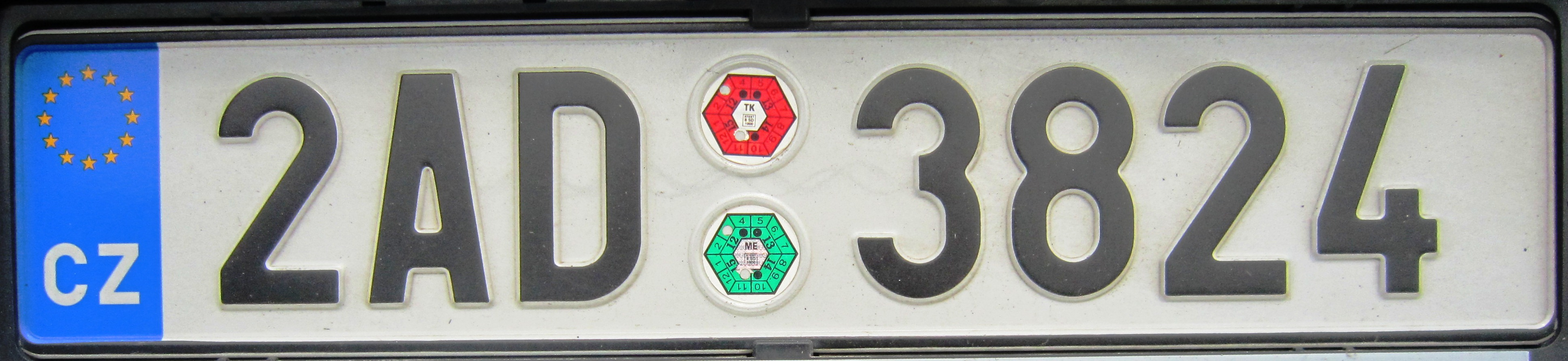 Tjechische kentekenplaat EU